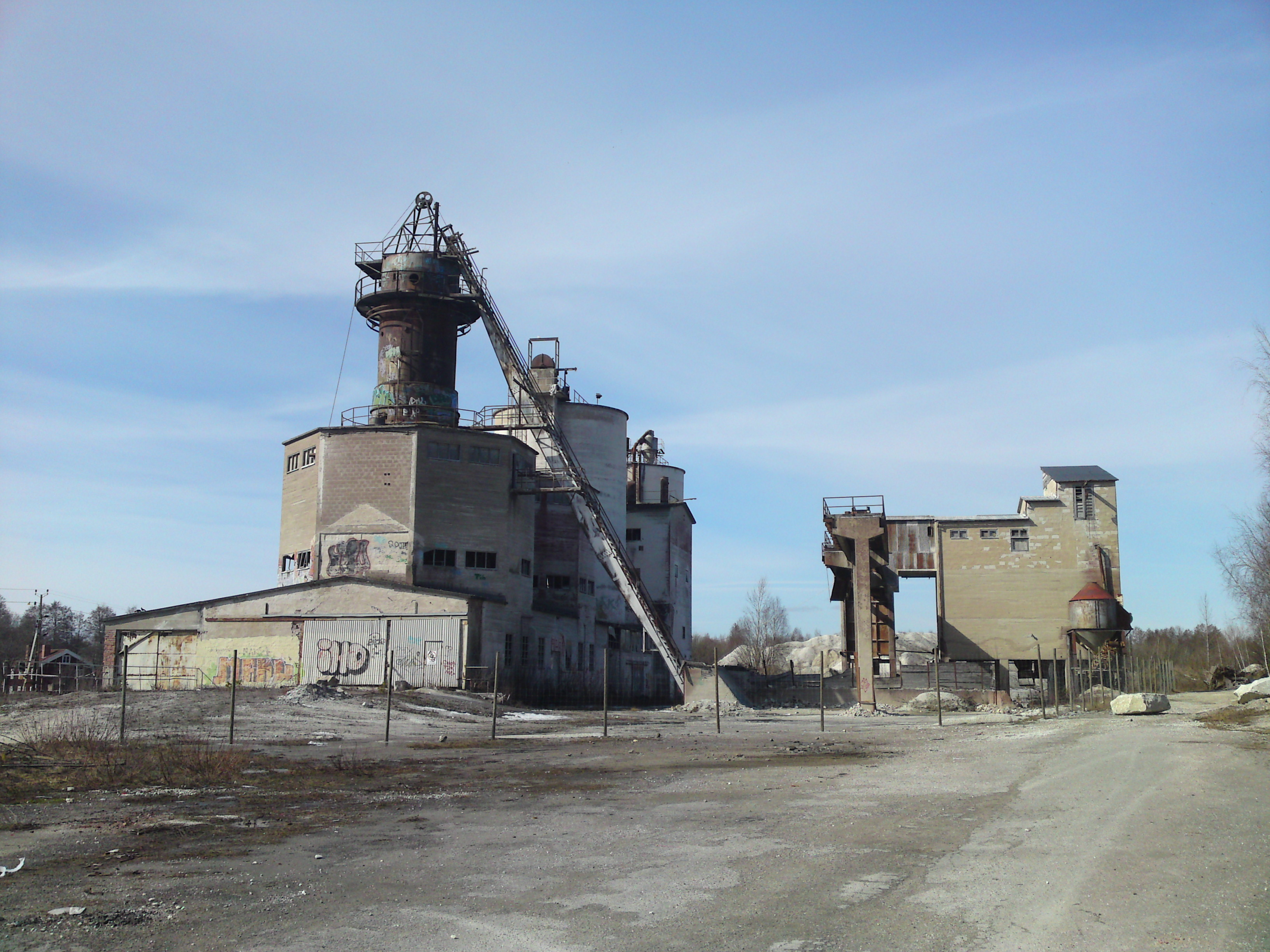 Strå kalkbruk, Sala, Västmanland, Sverige